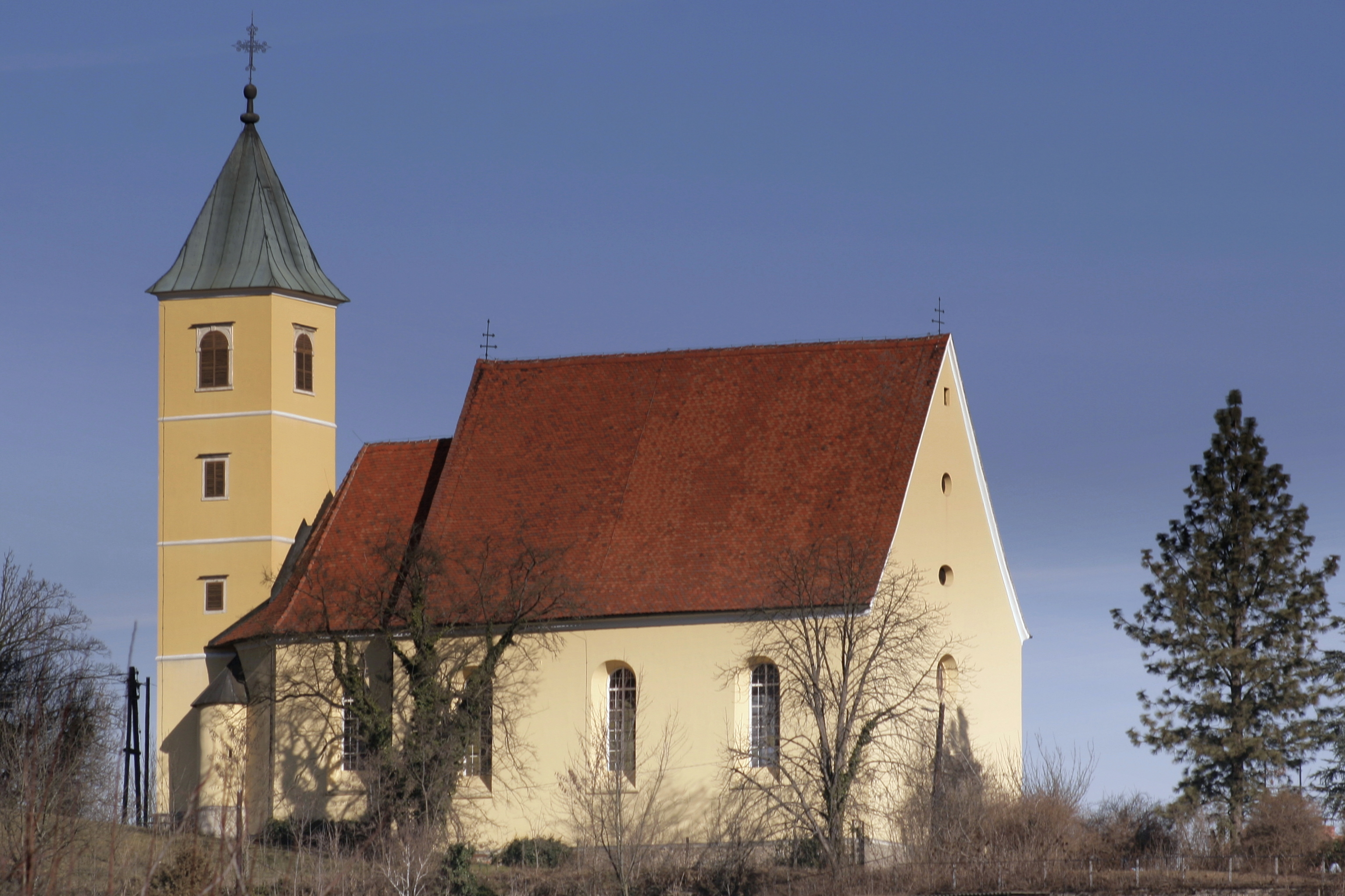 Kath. Filialkirche hl. Martin/Schlosskirche